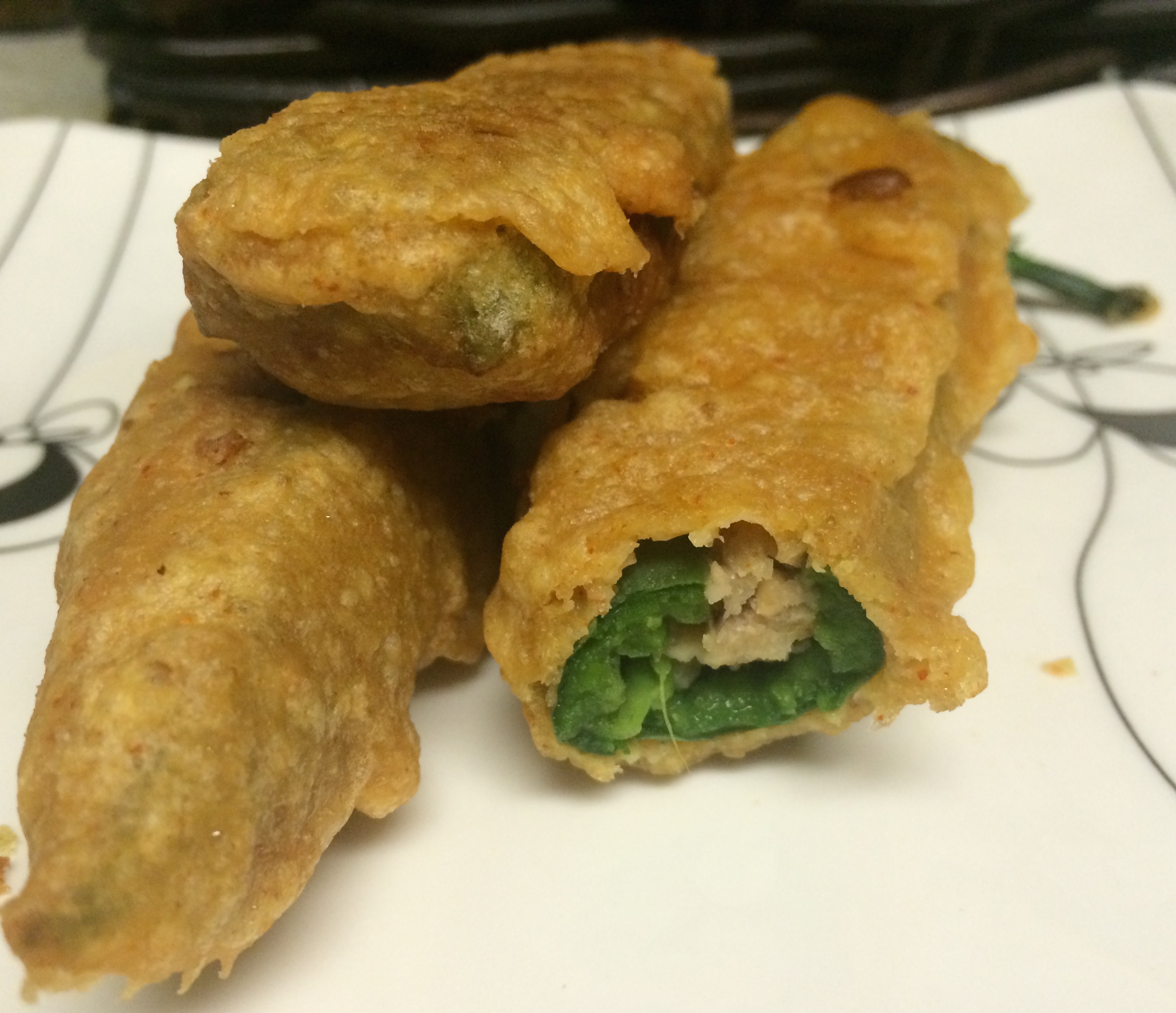 Stuffed Mirchi Bajji